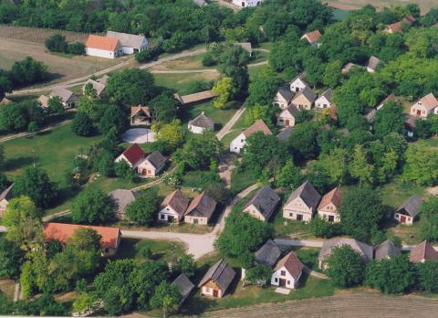 Györköny, Hungary, aerialphotography